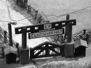 camp internament Vernet d'Ariège